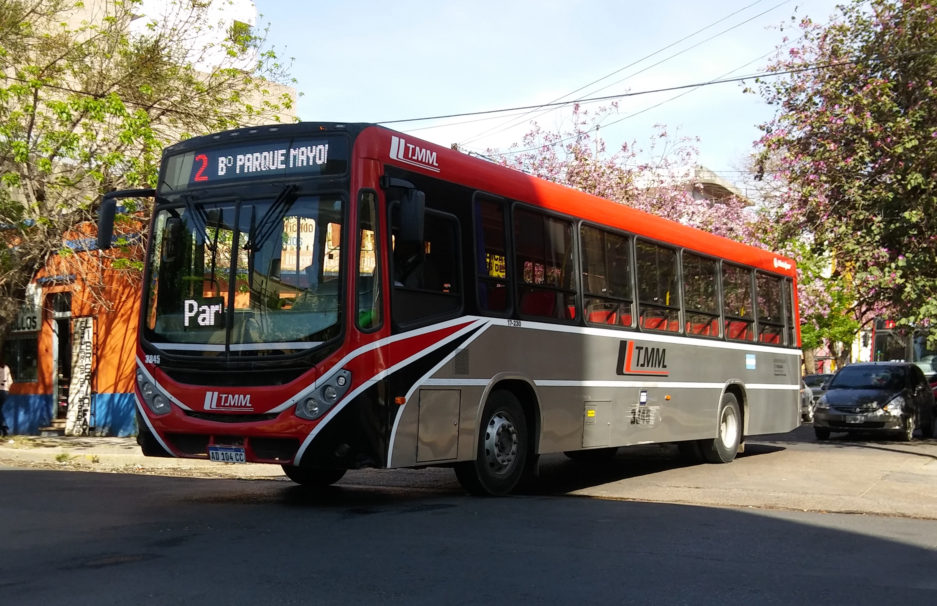 Transporte Mariano Moreno (Grupo ERSA) Línea 2 - #3845 Metalpar Tronador 3ra Generación Volkswagen 17.230-OD